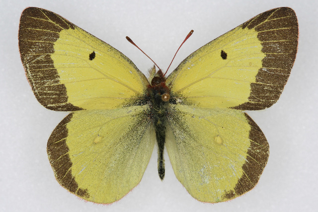 Colias scudderii